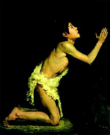 Saint Jean-Baptiste au désert